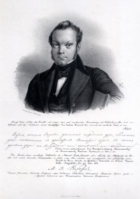 Mihhail Rosbergi portree